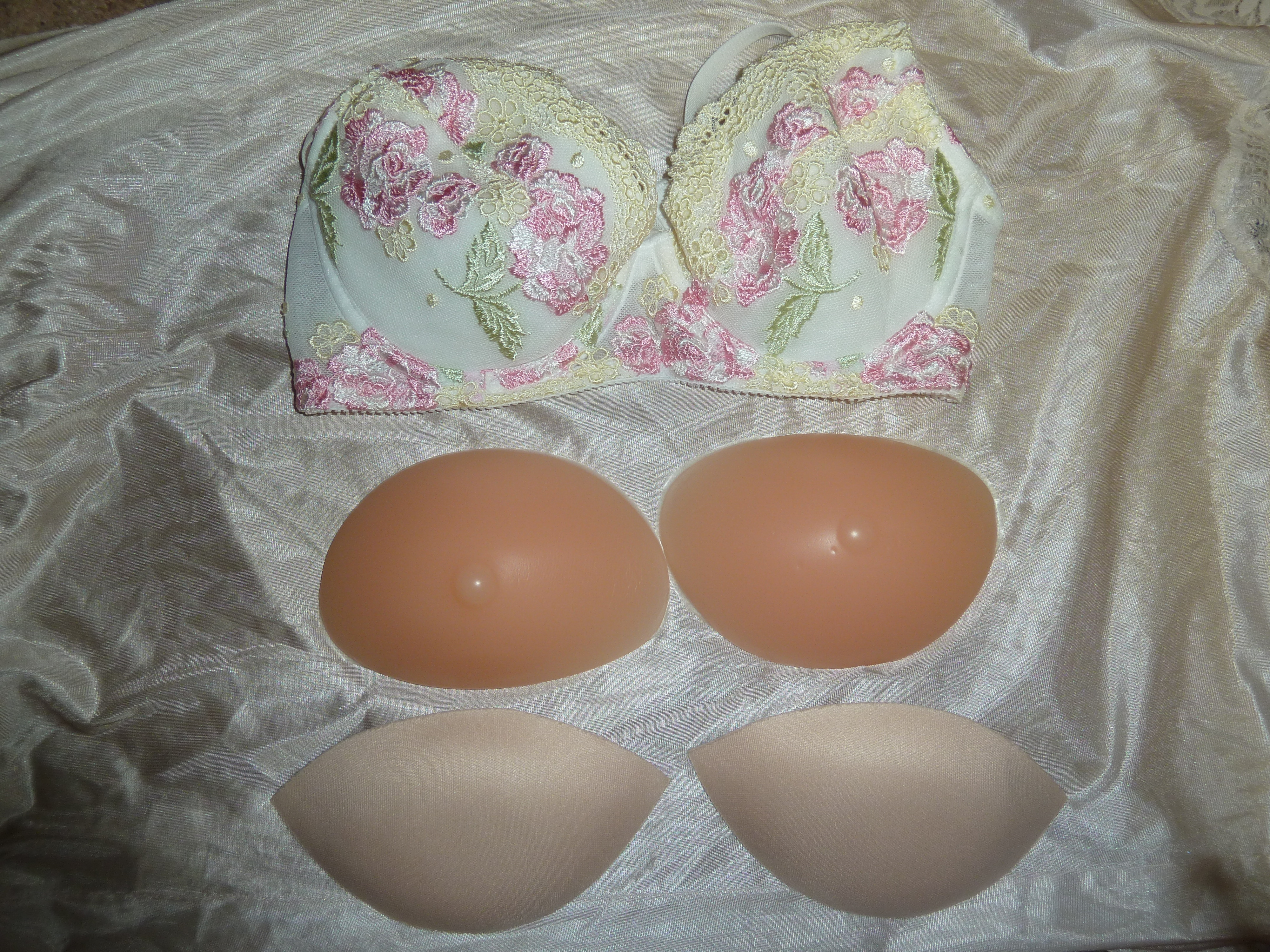 B75サイズの3/4カップのブラジャーと、ブラパッド2種（上がシリコン製、下がウレタン製）